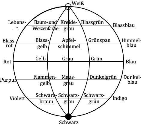 Forsius´Farbkugel von 1611